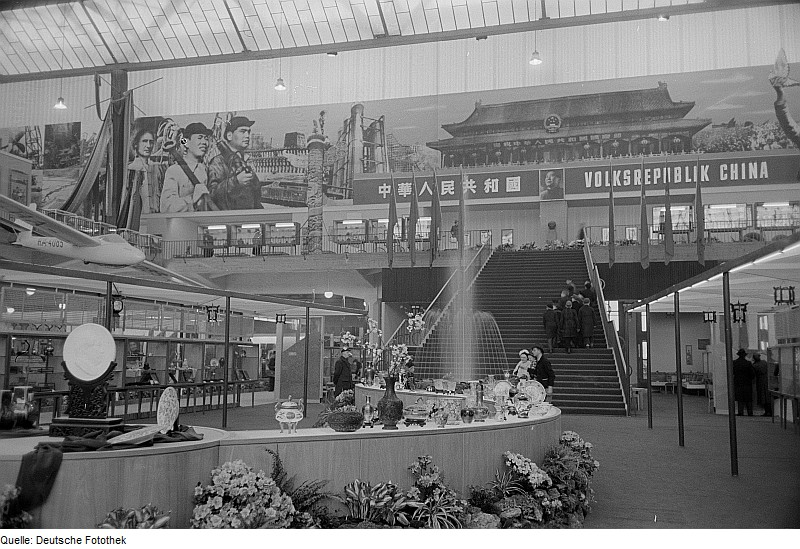 Original image description from the Deutsche Fotothek Innenansicht einer Messehalle mit Springbrunnen vor dem Treppenaufgang zur Ausstellungshalle von China